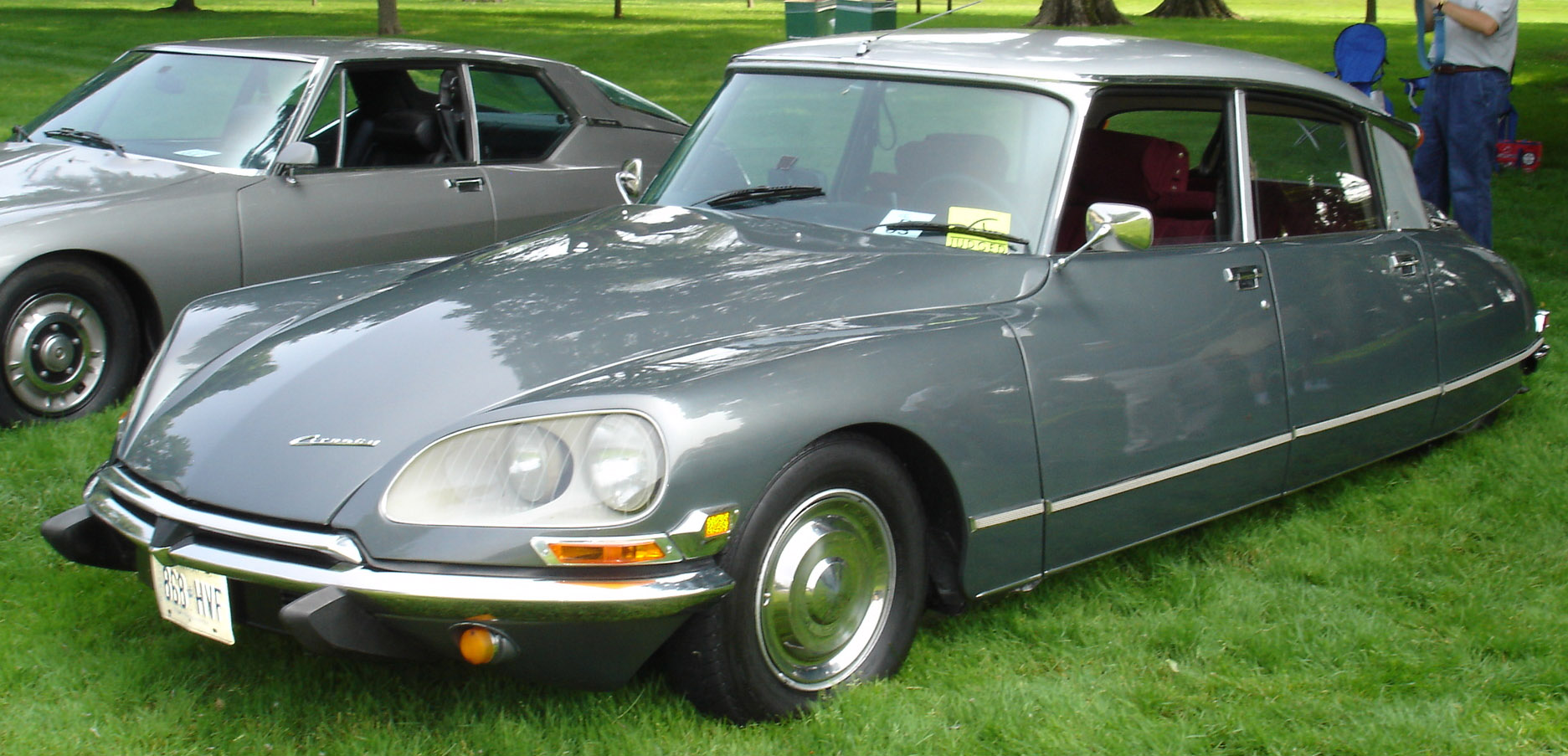 Citroen DS